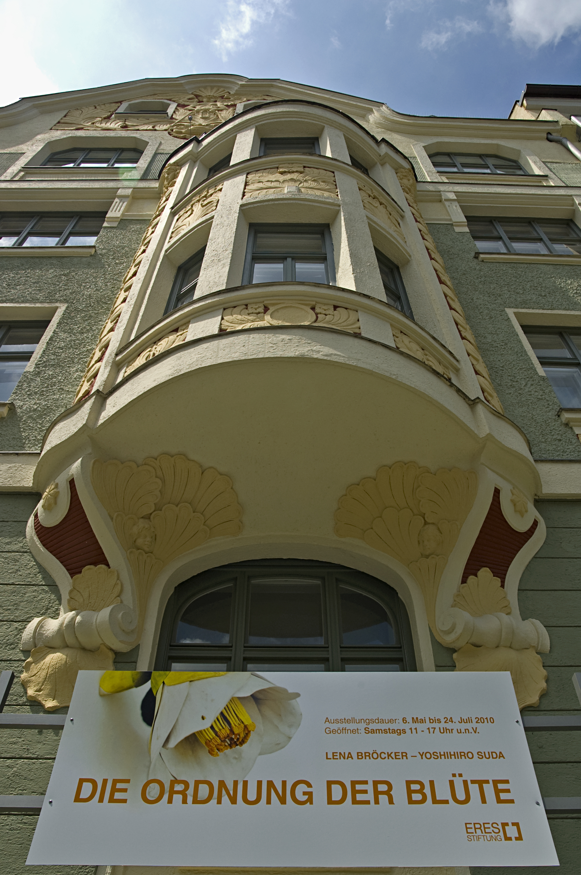 Römerstraße 15; Mietshaus, Jugendstil, mit halbrundem Erker und sehr reichem Putz- und Stuckdekor, 1900 von Eugen Hönig und Karl Söldner, derzeitiger Sitz der ERES-Stiftung